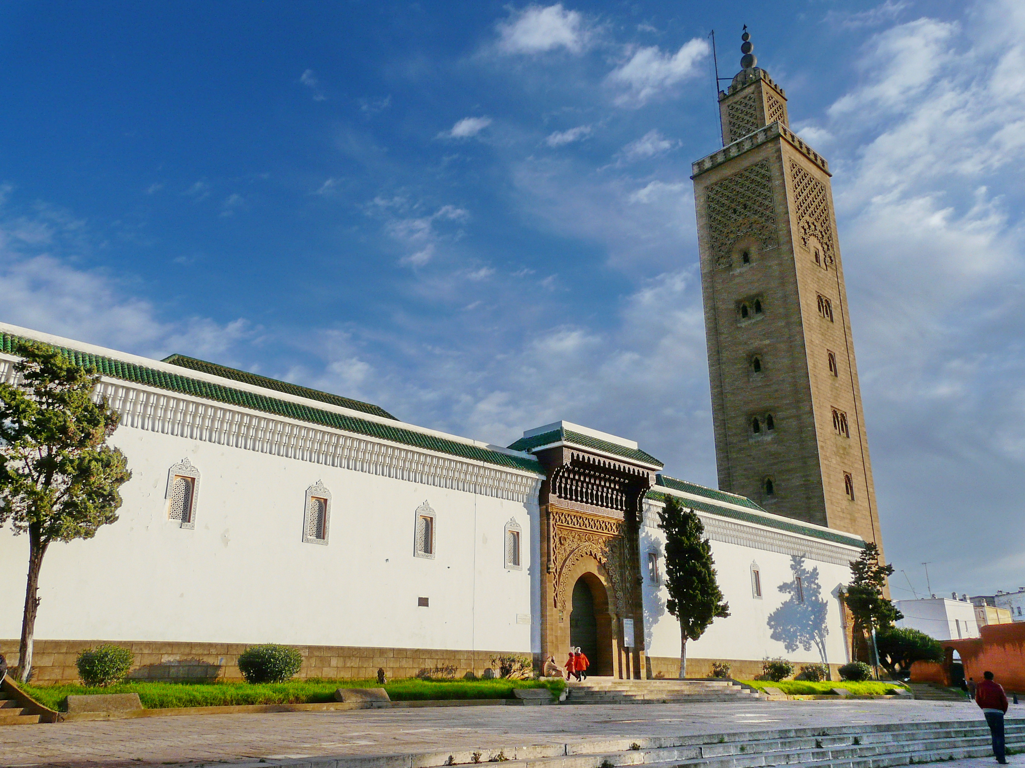 Rabat, Morocco